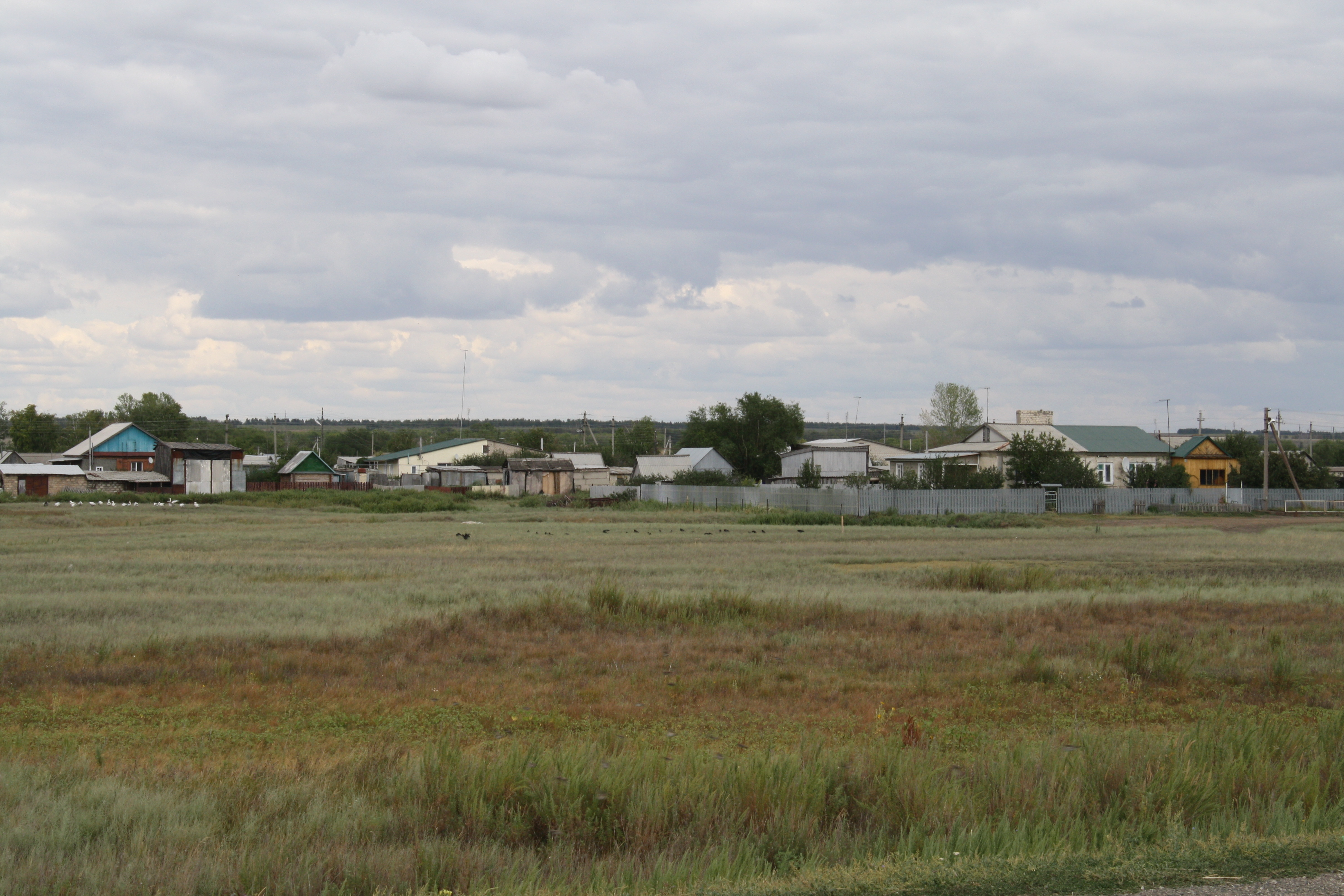 Provincial town. Samara reg. Russia. Провинциальный поселок. Самарская обл. Россия